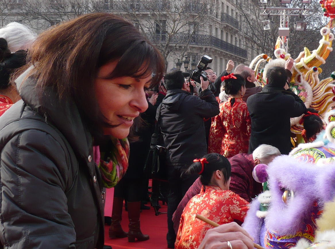 Anne Hidalgo au lancement du Nouvel An chinois Place de l'Hôtel de Ville de Paris